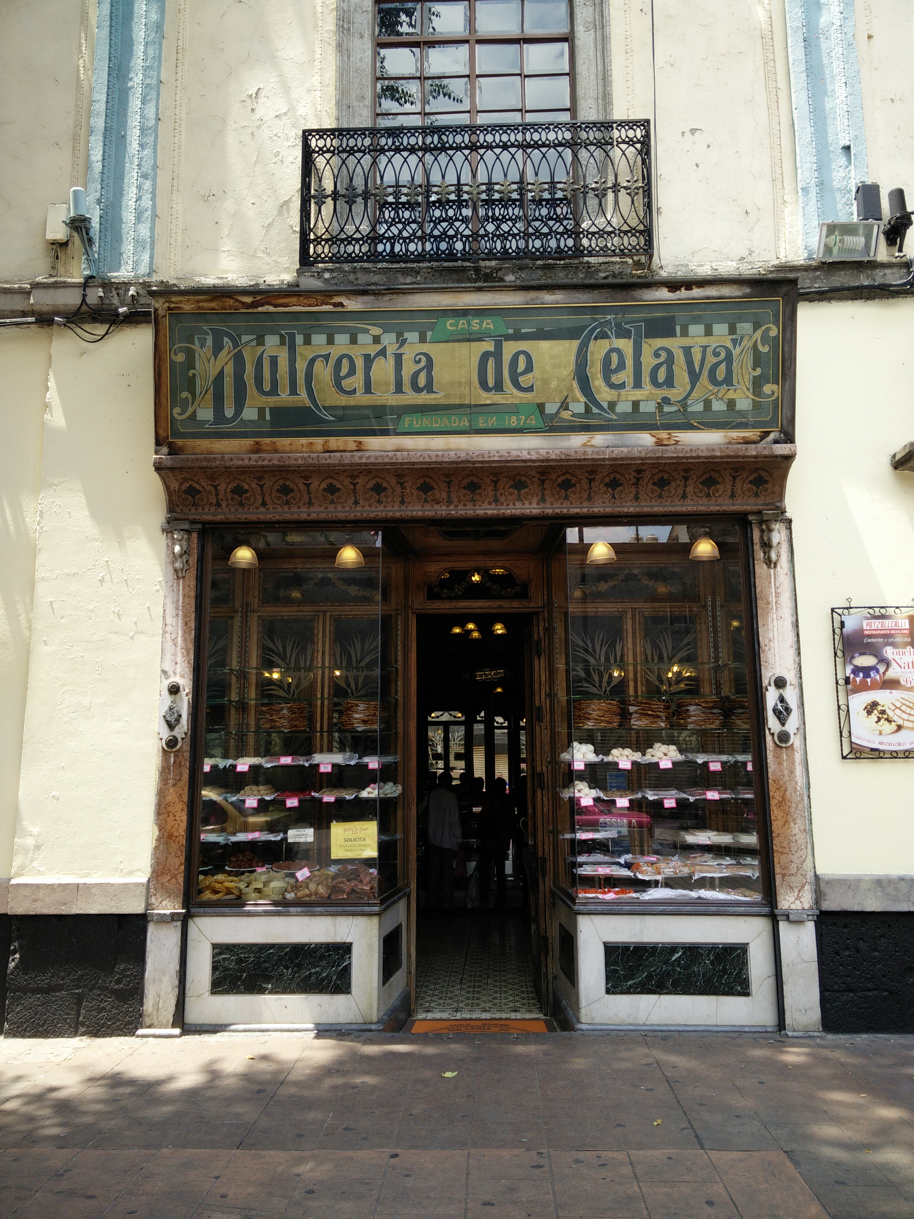 Dulceria de Celaya, a renowned candy and sweets shop in Mexico City